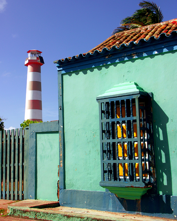 Icono del pueblo pesquero de Adícora es su faro así como su arquitectura antigua y colorida, visitando las zonas de playa del Estado Falcón podemos llegar a este lugar donde el paso del tiempo no lo ha cambiado con los años y nos deja recrear el antiguo puerto para mercancías entre Aruba, Curazao, Bonaire, y Jamaica para finales de los mil ochocientos.